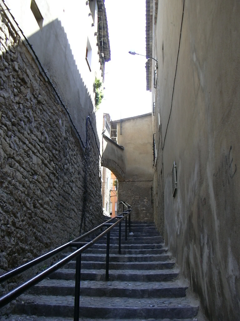 Gradläufiger Treppenlauf mit zentralem Handlauf zu einem alten Stadttor in den Stadmauern von Fraga, Spanien.